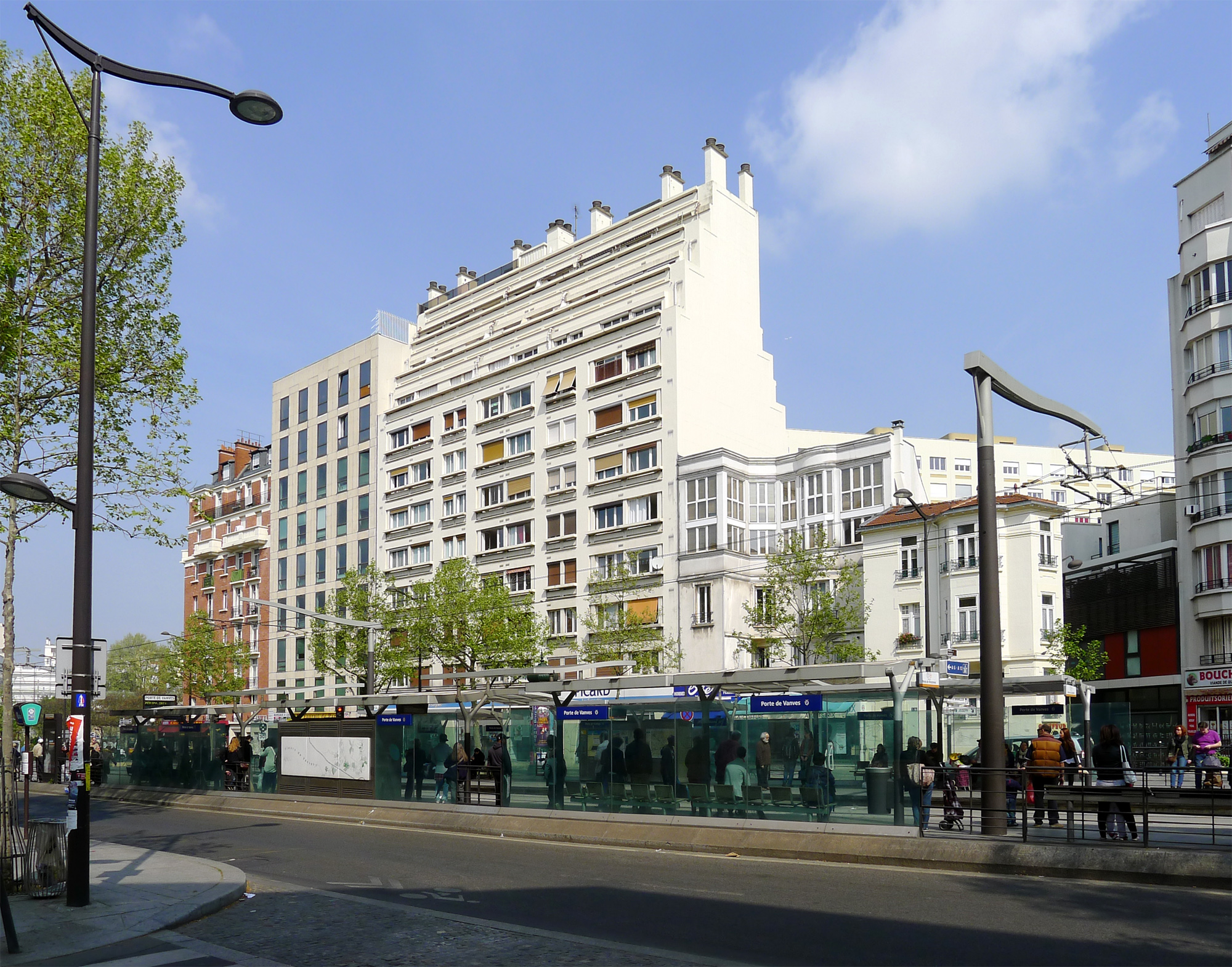 Porte de Vanves (Ta3) - Paris XIV